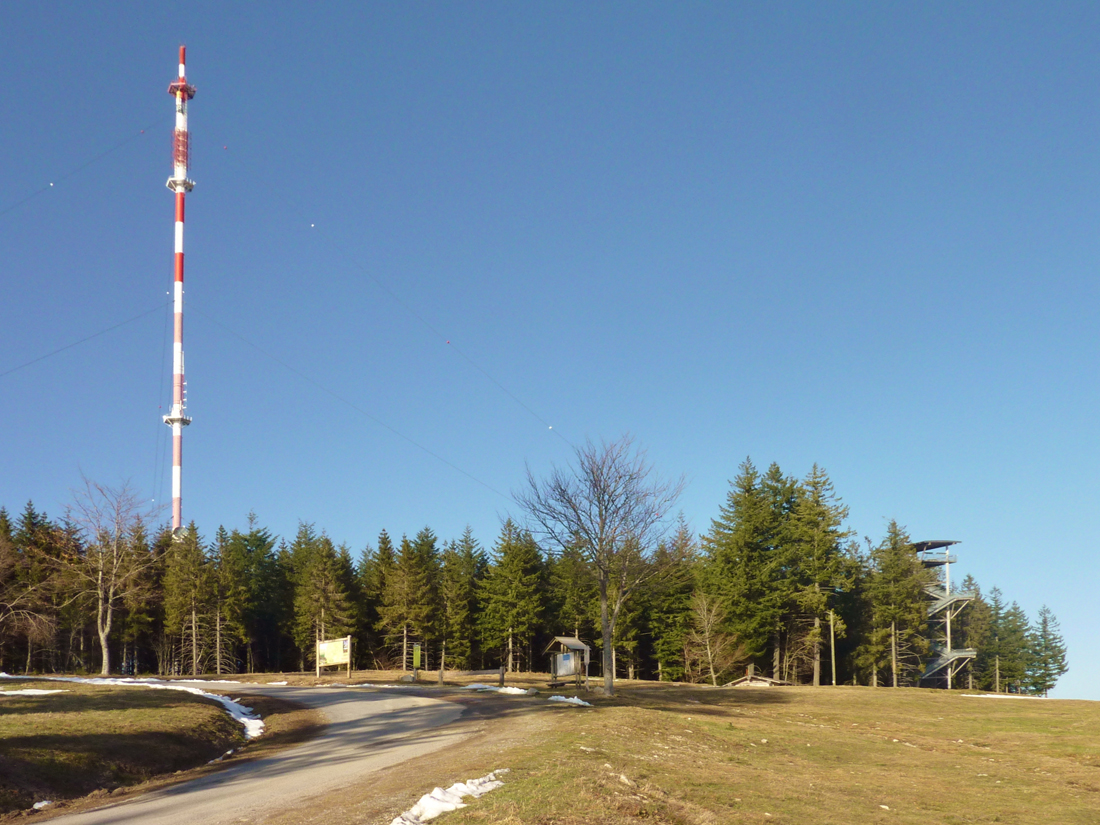 Mont Bessou - Antenne et tour